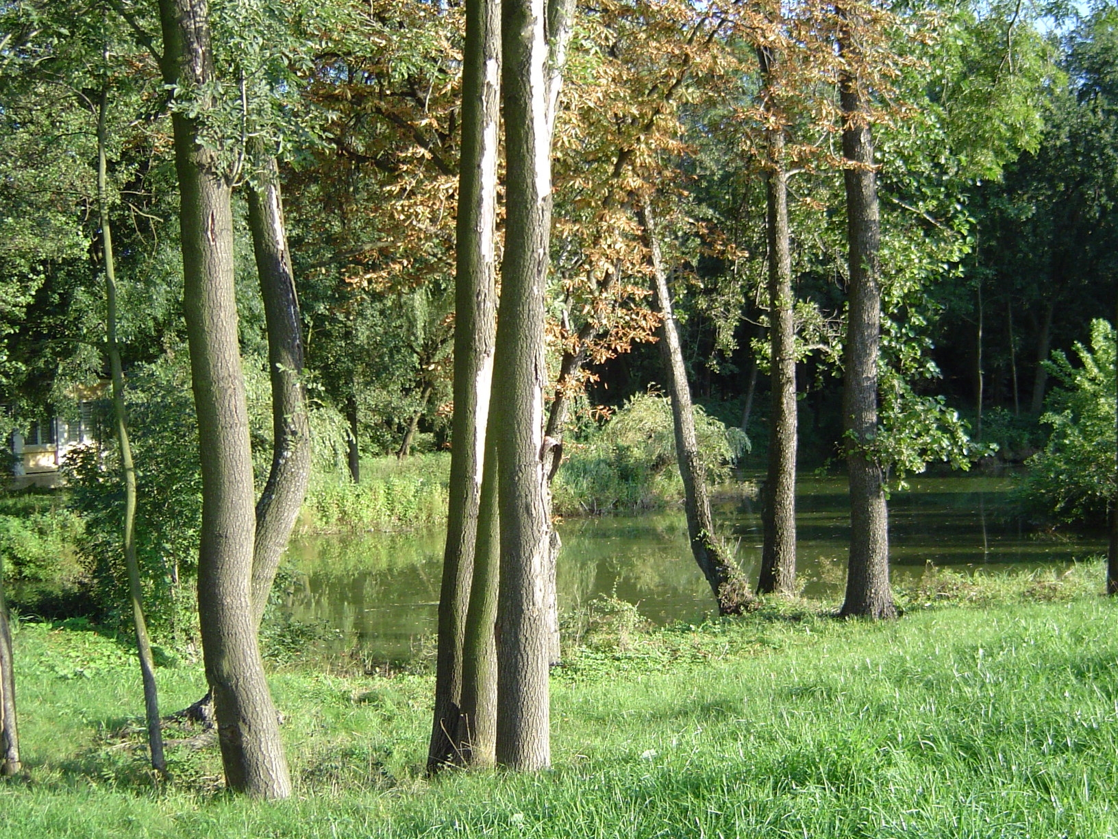 Solec-Zdrój - park